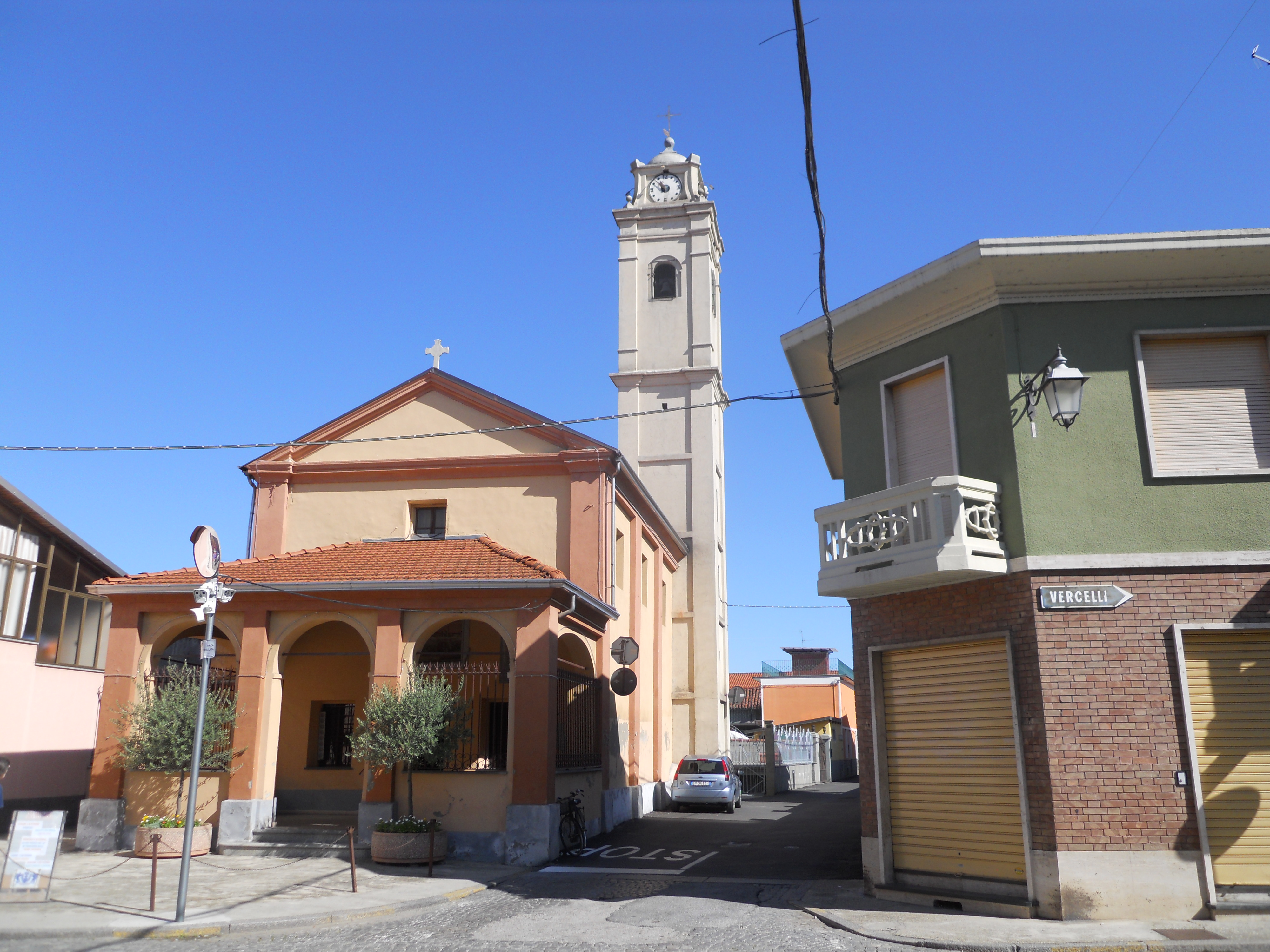 Chiesa Rionale di San Bonaventura